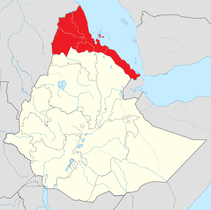 エリトリア州（Eritrea Province, 1962-1993）の位置地図。